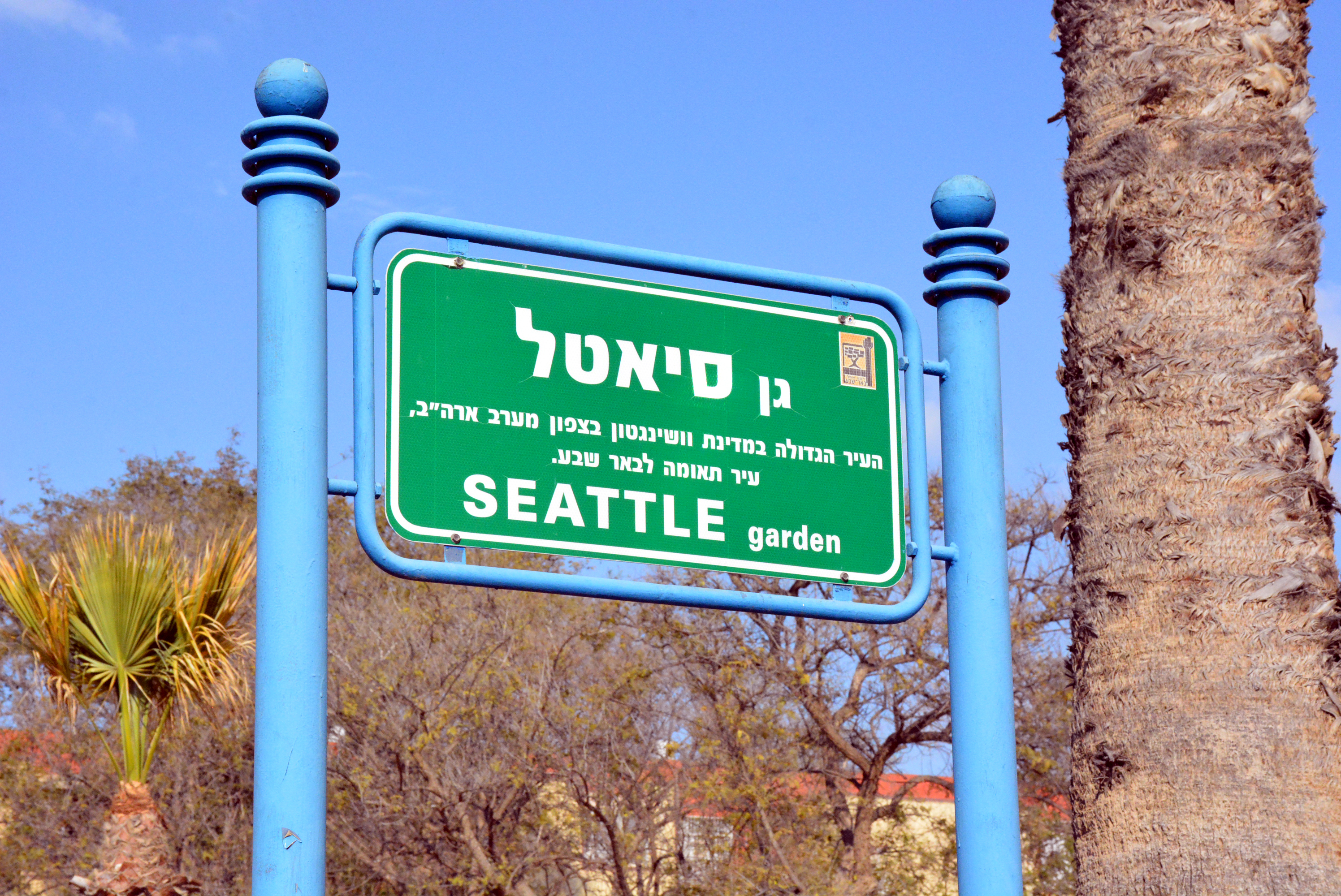 שלט הכניסה לפארק גן סיאטל